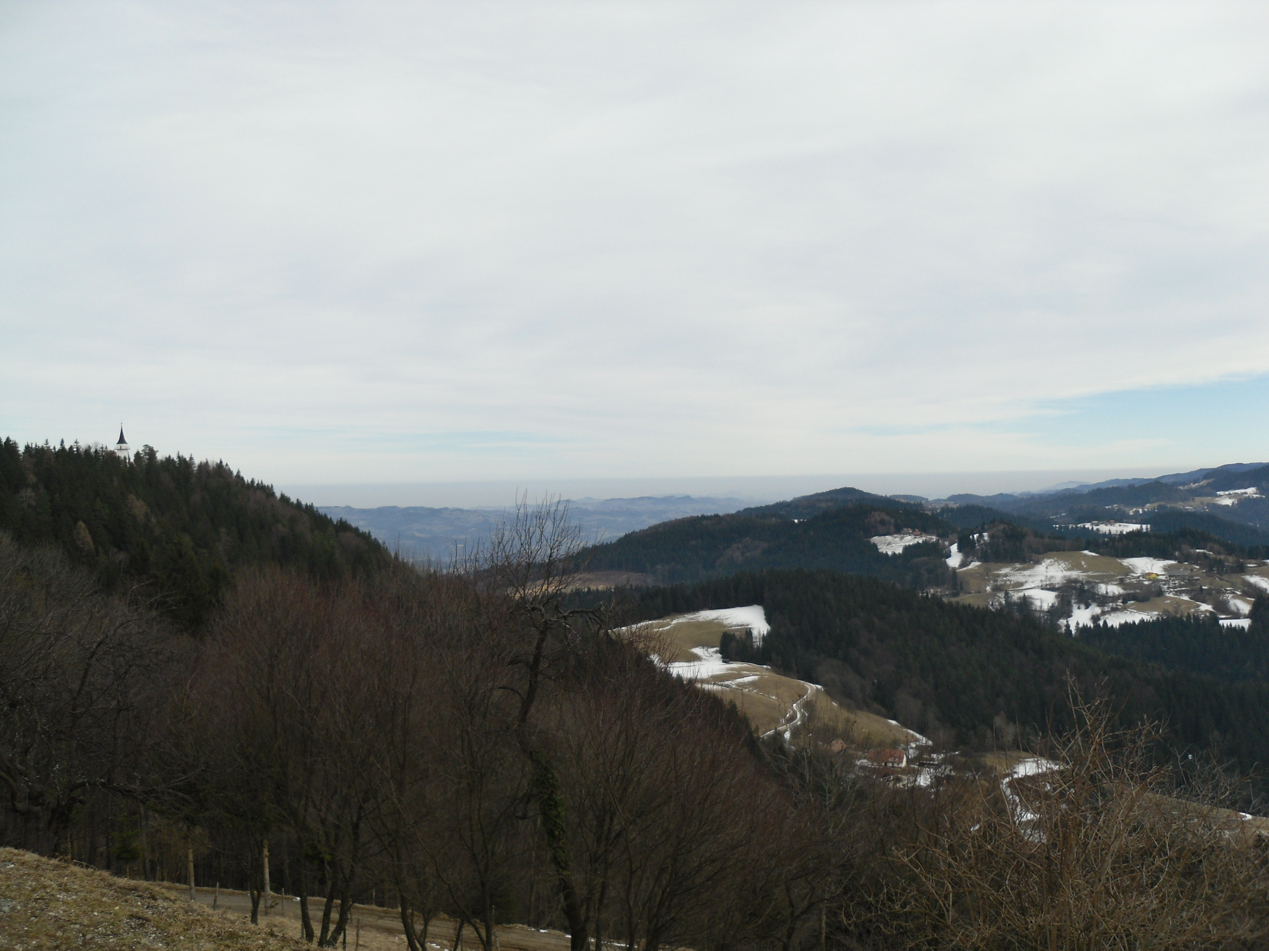 Pongrac - pogled proti mejnem grebenu Remšnik